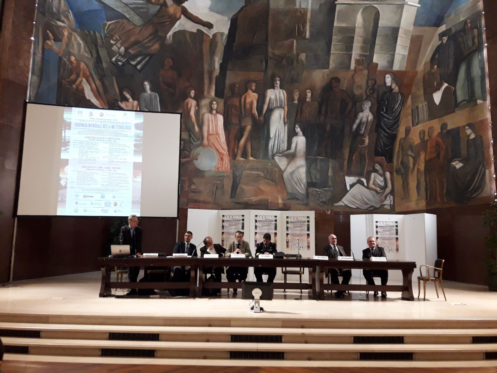 Aula Magna Università "La Sapienza" in Roma